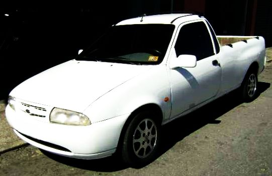 old picture courier